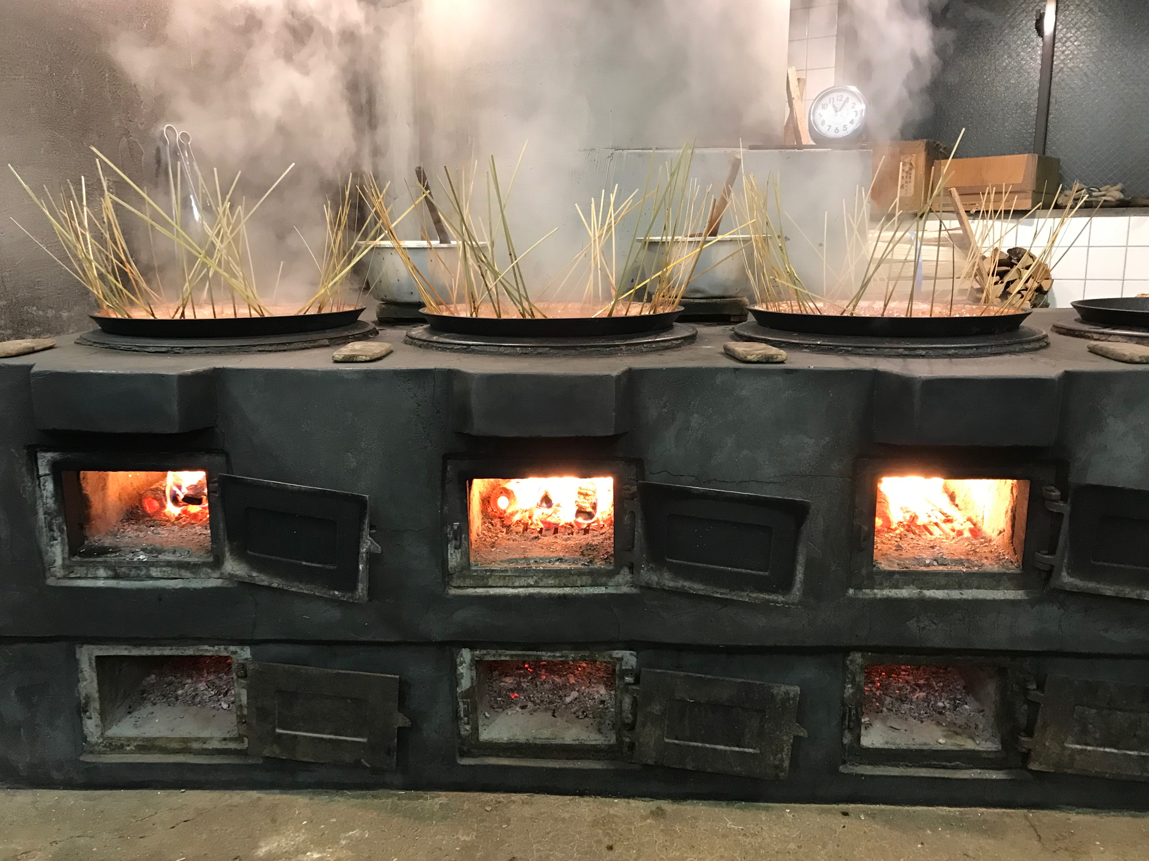 文久2年の創業以来、鮒佐ではへっついを用いて佃煮の製造を行っている